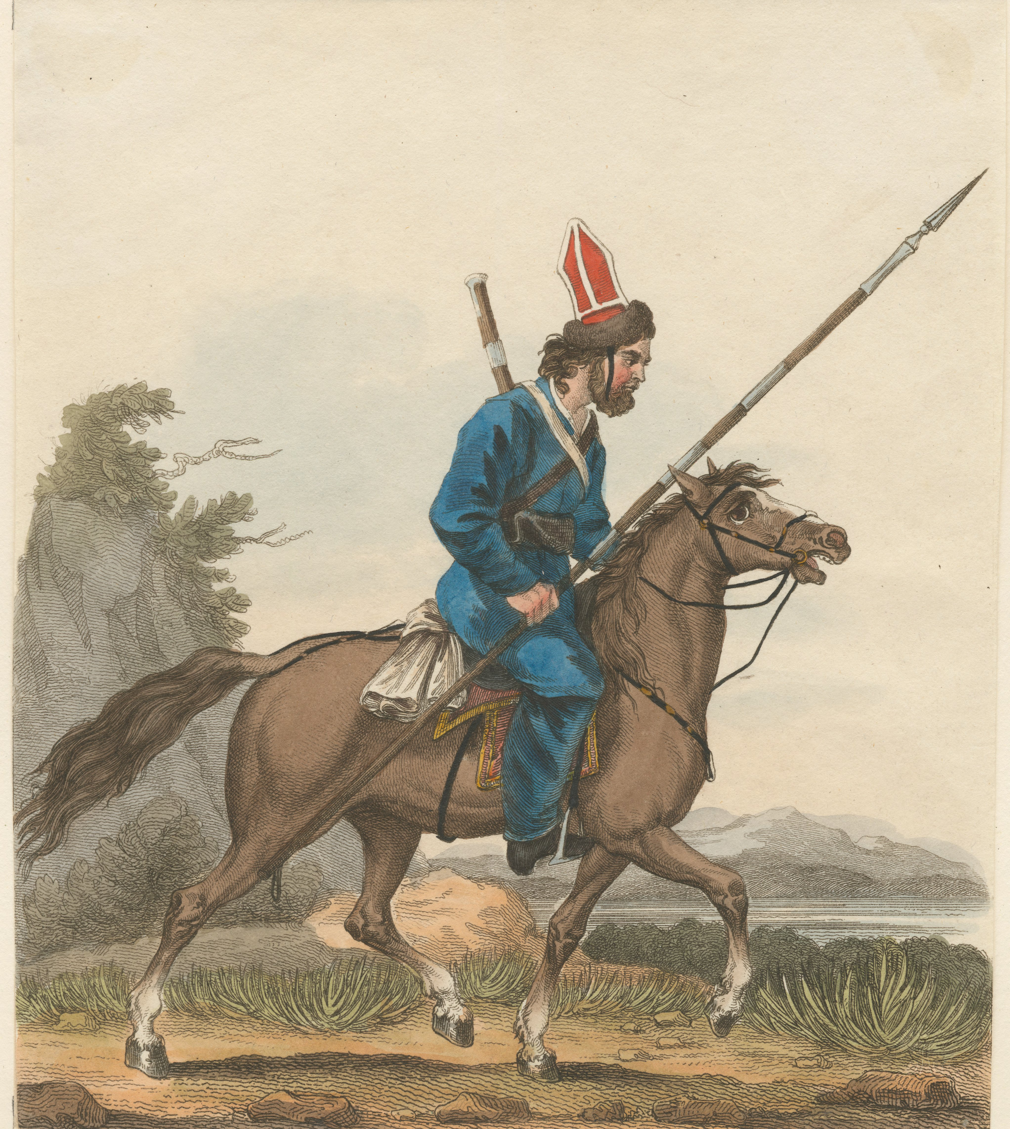 Cossack du Don en 1813